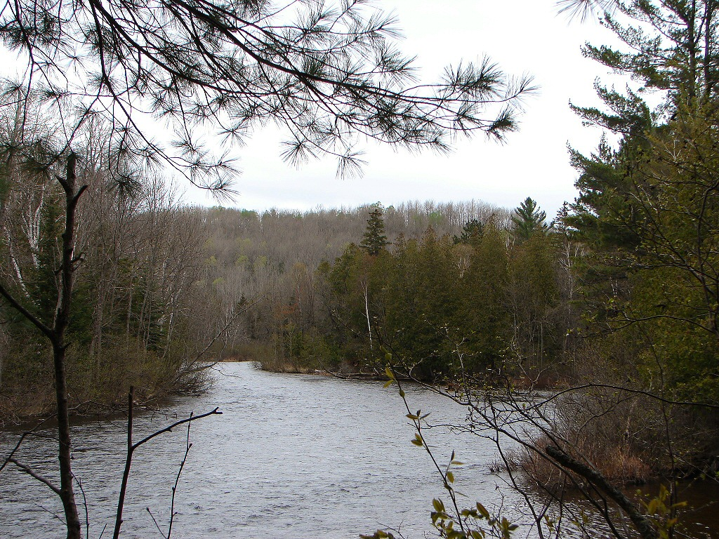 Opeongo River, Ontario, Canada